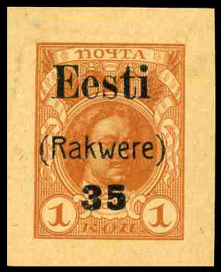 Почтовая марка Раквере (Эстония)